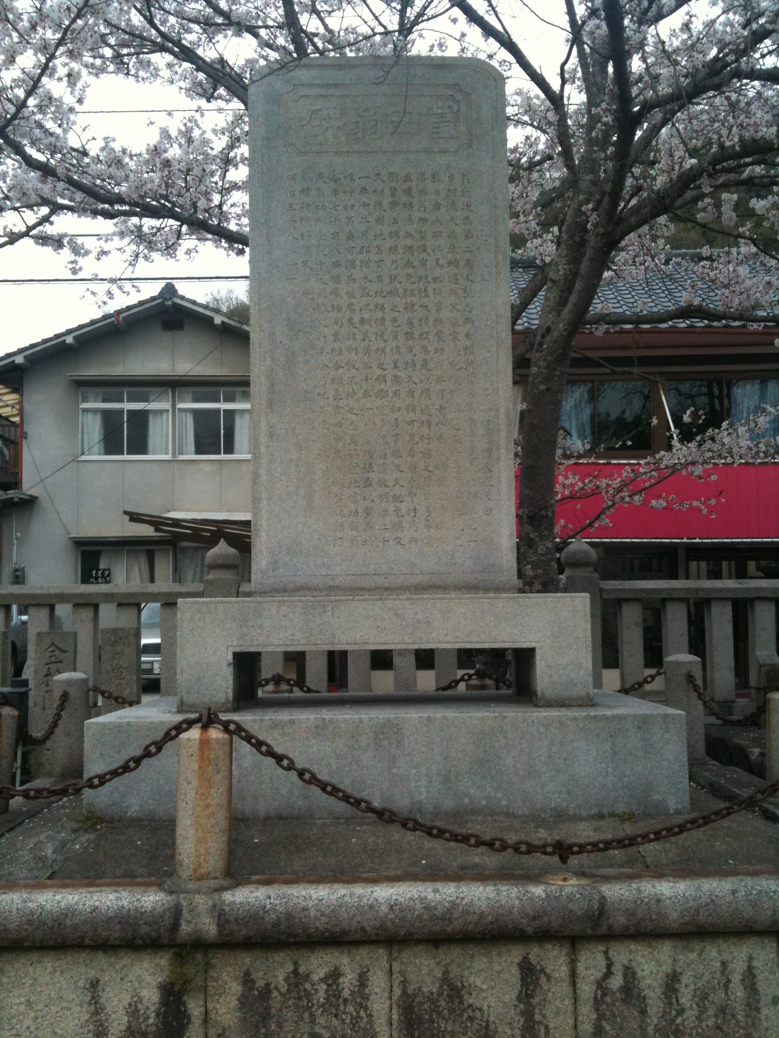 福山市新市町の吉備津神社境内にある、富田久三郎の功績を称える石碑